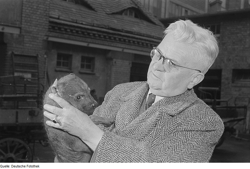 Original image description from the Deutsche Fotothek Portrait des Zoodirektors Karl Max Schneider mit einer jungen Hyäne in der Hand